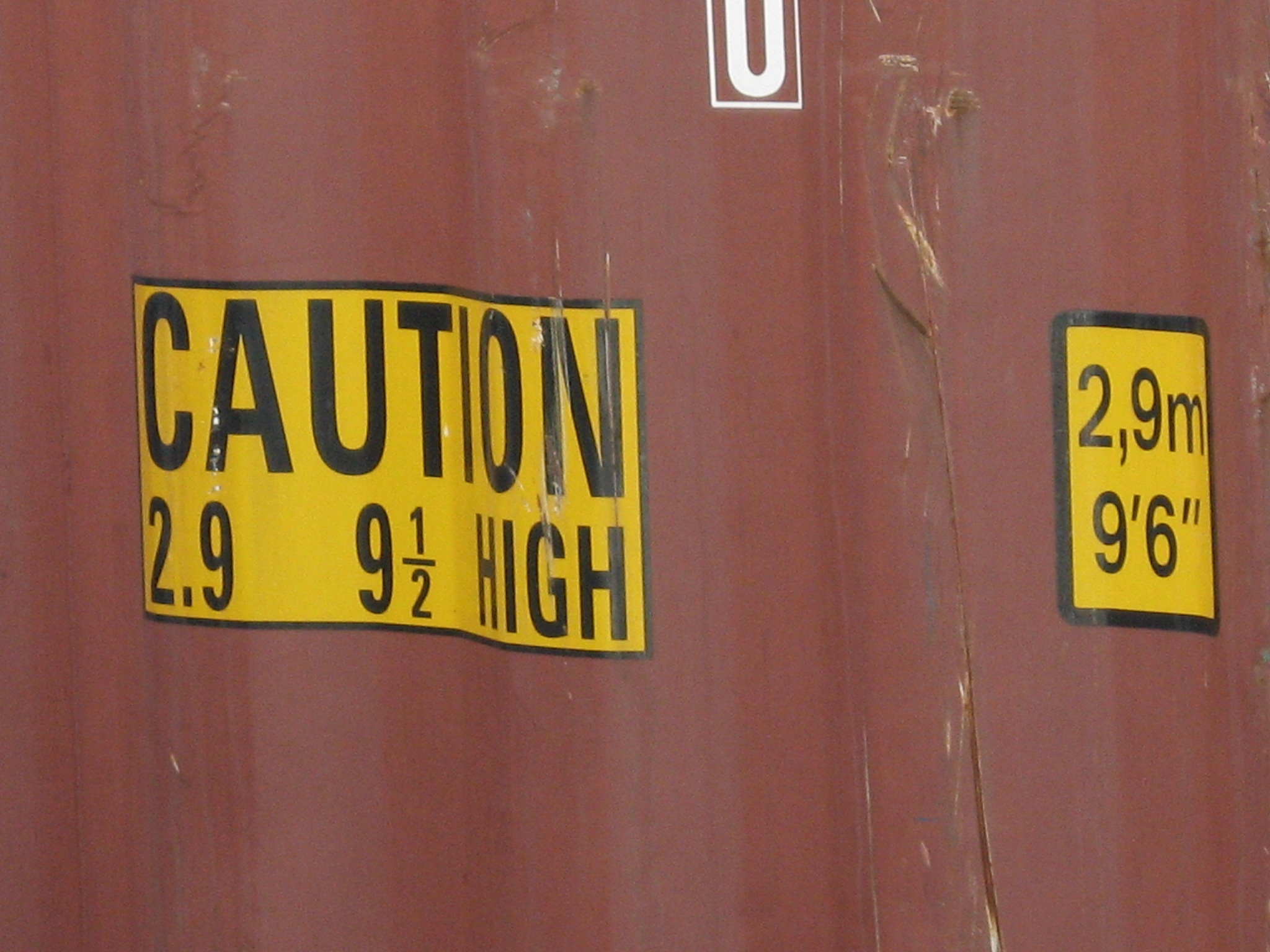 コンテナの資料画像。